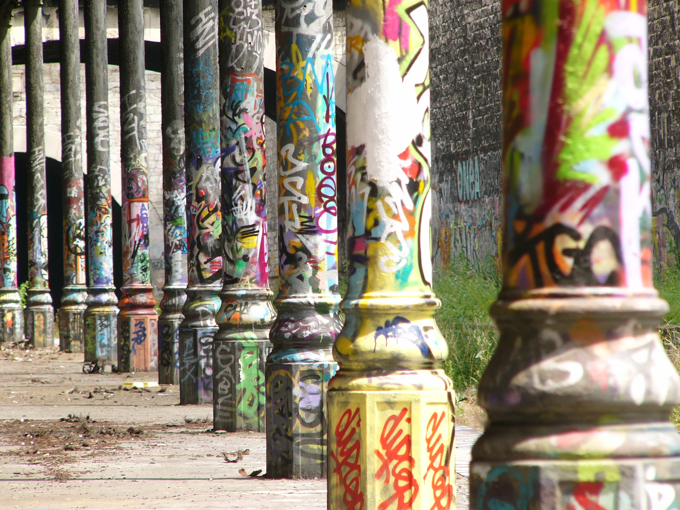 Chemin de fer de Petite Ceinture, Pillars à la Gare de l'avenue de Saint-Ouen, XVIIIe arrondissement, Paris, France.